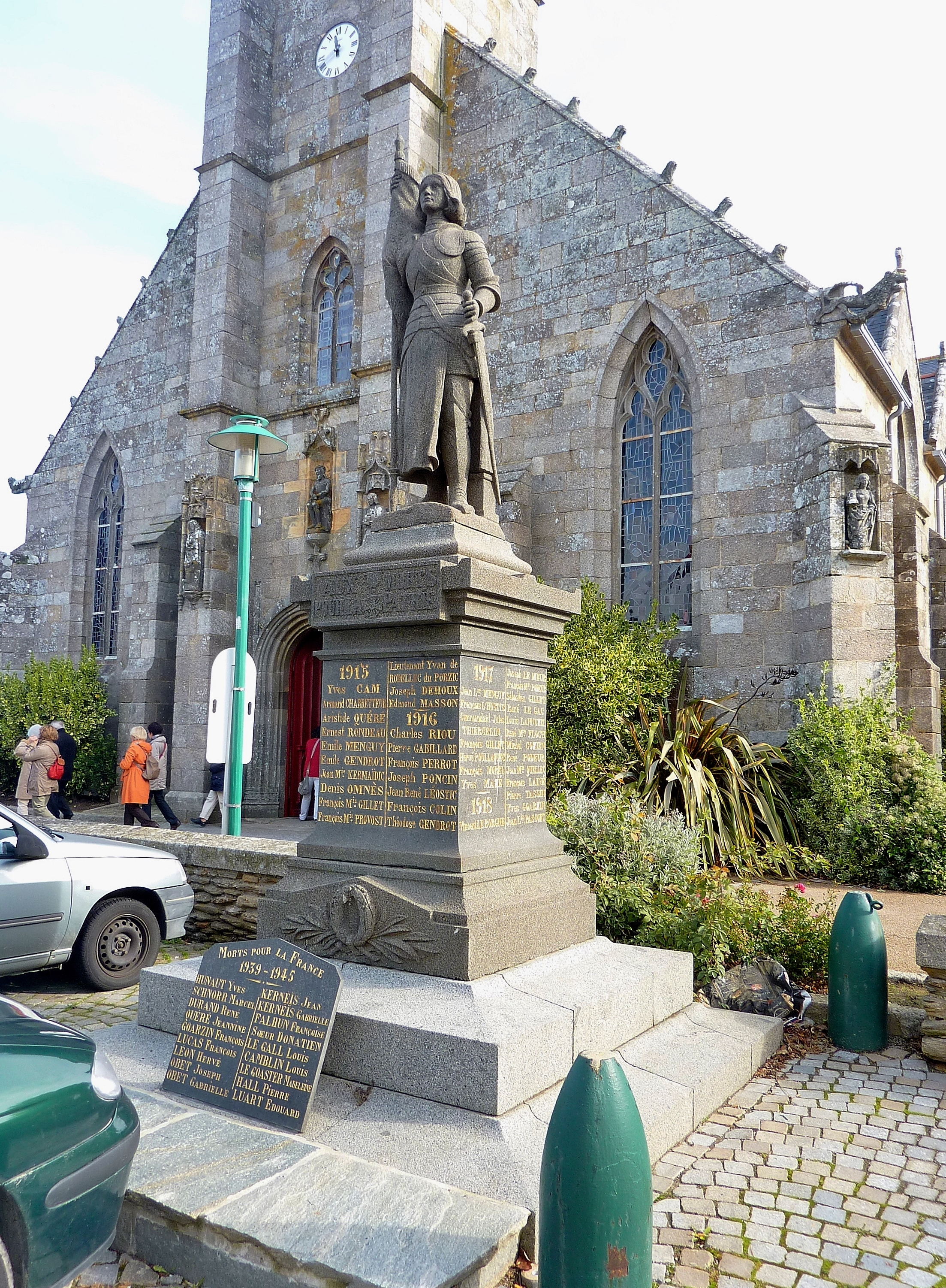 Le Conquet : le monument aux morts.